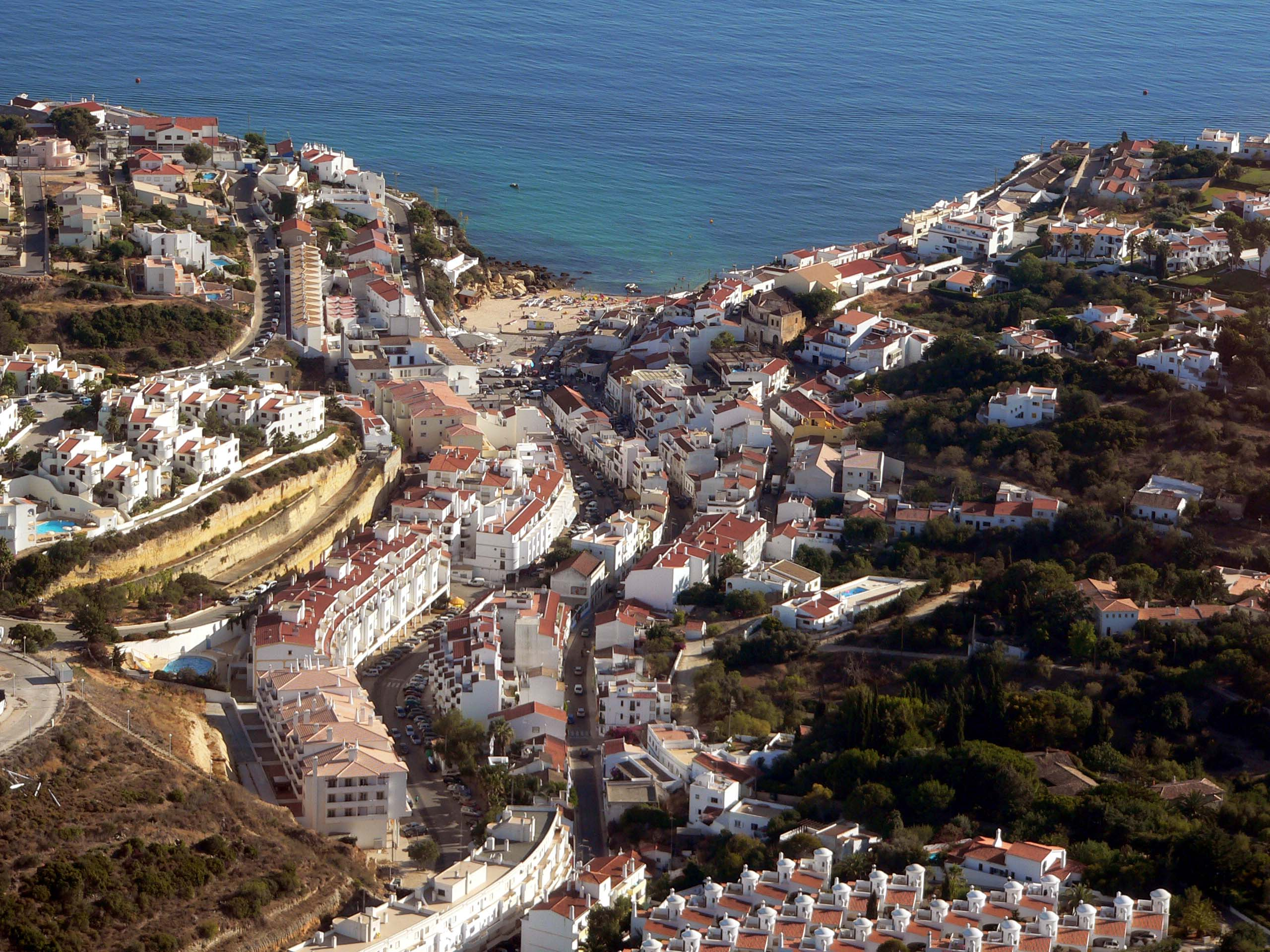 Carvoeiro - Algarve - Portugal